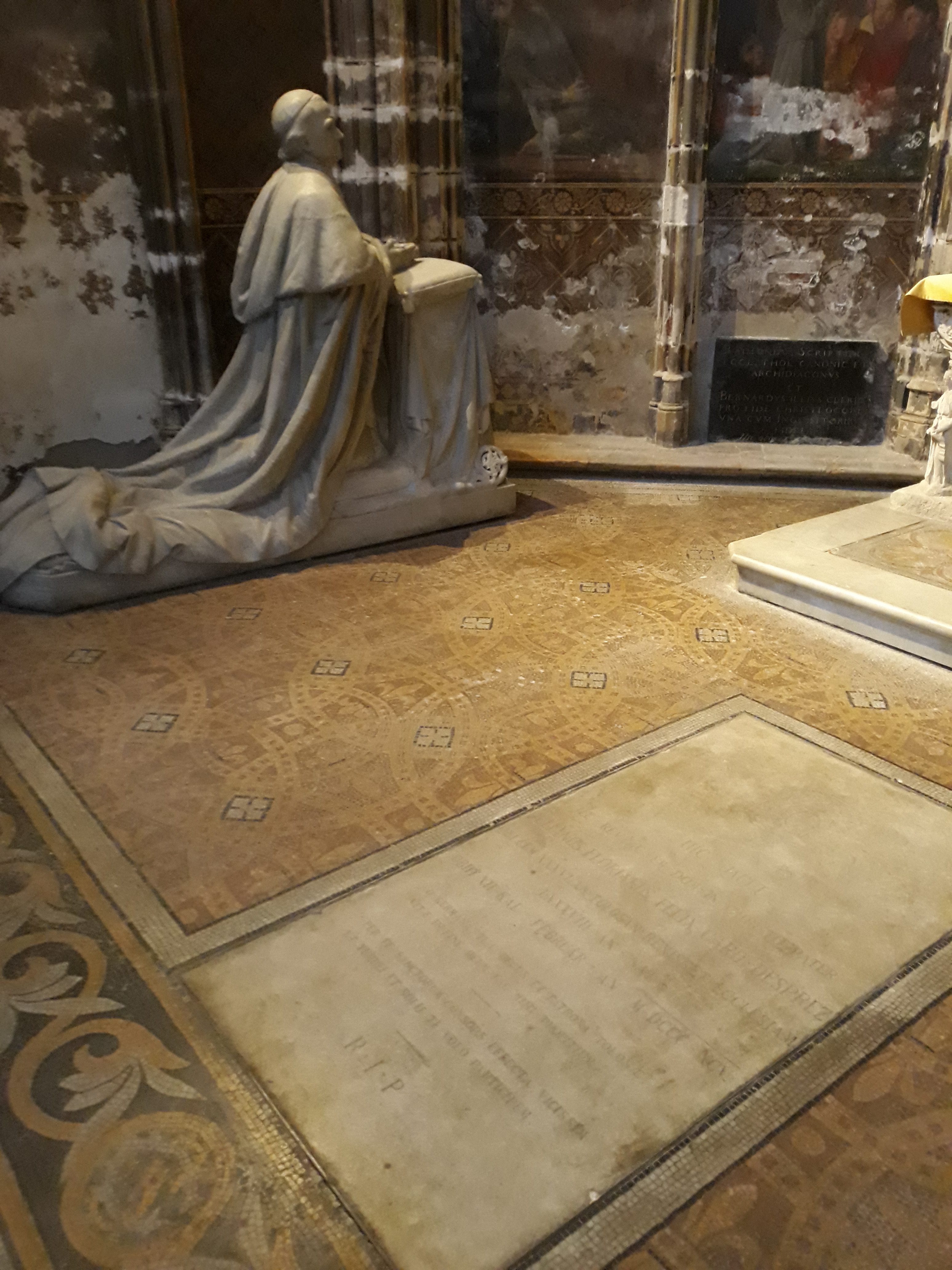 Das Grab des französischen Theologen und Erzbischofs von Toulouse Florian Desprez in der Kathedrale von Toulouse.